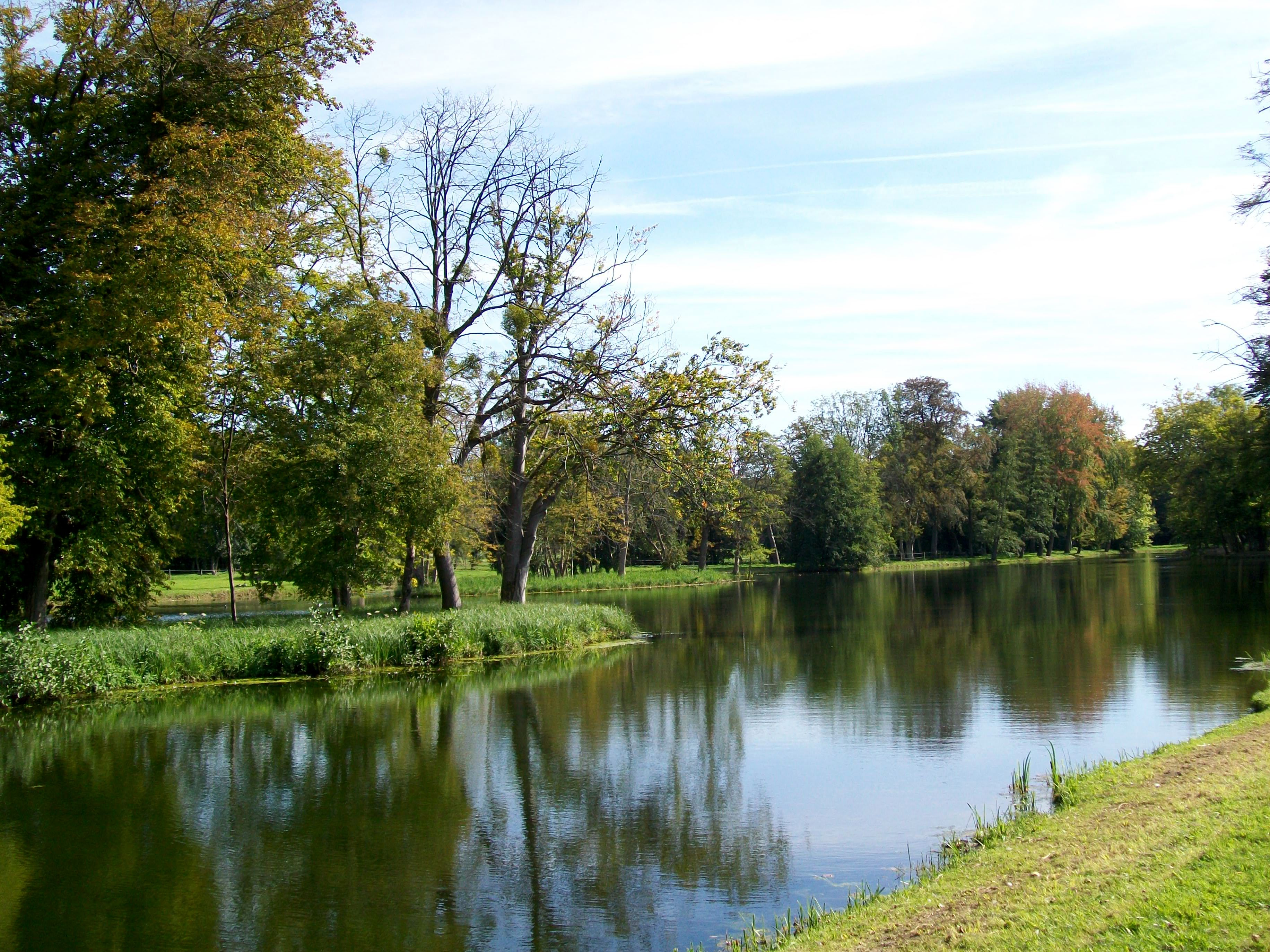 Le grand étang, alimenté par la Nonette qui avait été détournée par les moines à cet effet; à gauche, une île. Vue en direction du sud-est.